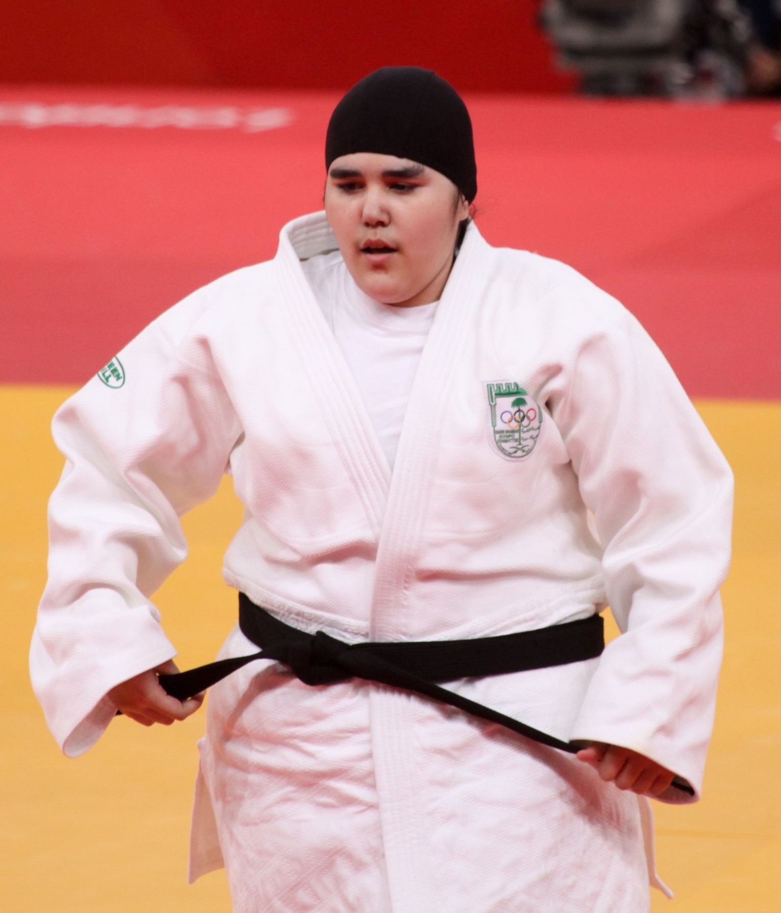 Saudi Arabian judoka, Wojdan Shaherkani at the 2012 London Olympics